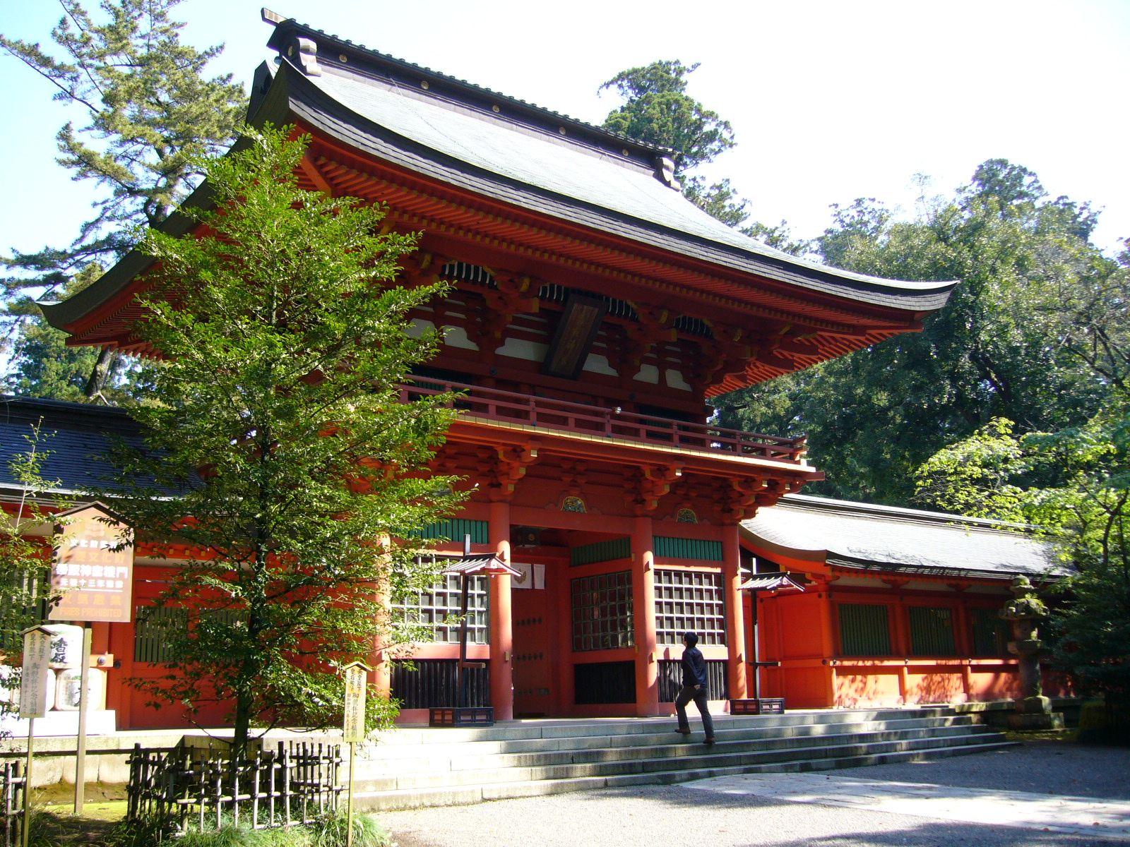 katori-jinguu-shrine-roumon,katori-city,japan